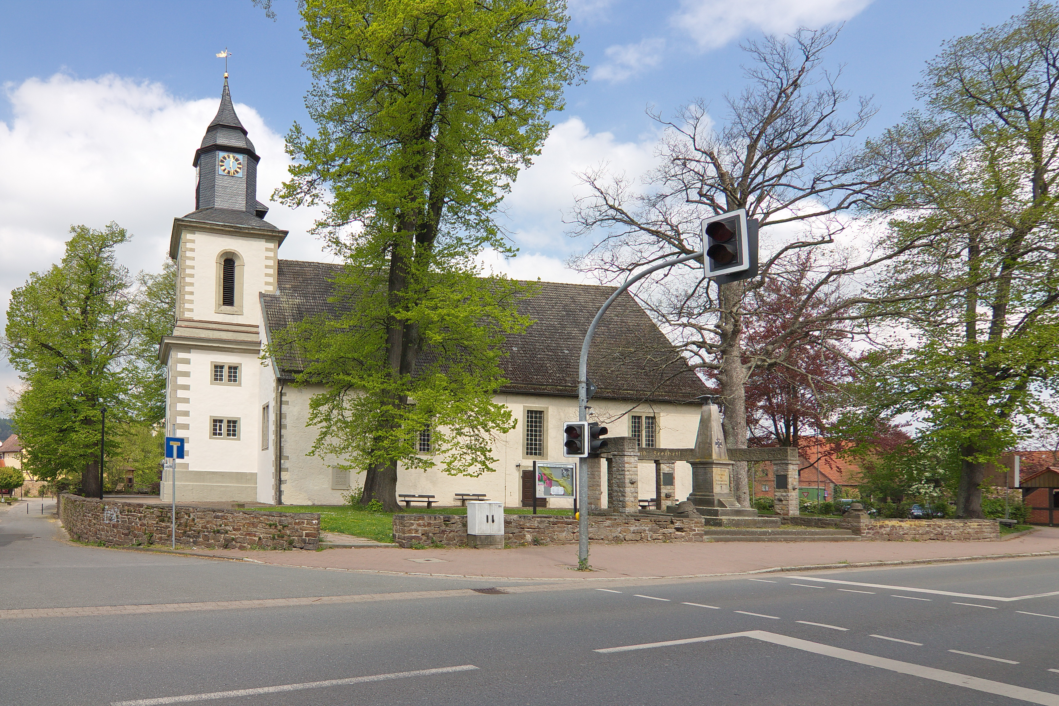 Marienkirche in Aerzen, Niedersachsen, Deutschland